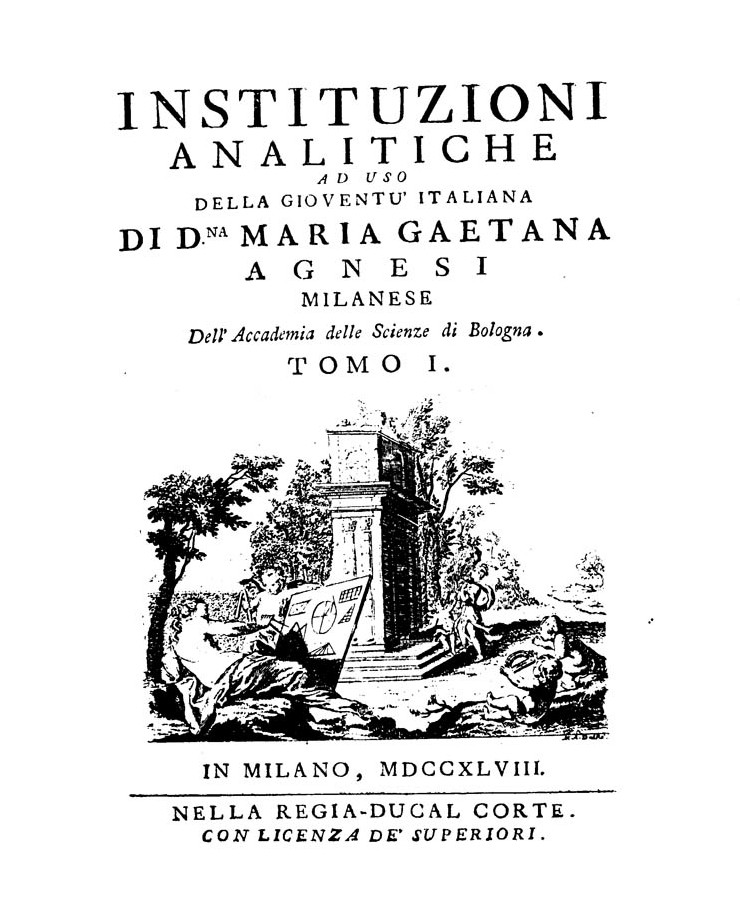 Instituzioni analitiche ad uso della gioventù italiana di d.na Maria Gaetana Agnesi milanese dell'Accademia delle Scienze di Bologna. Tomo 1. - In Milano : nella Regia-ducal corte, 1748. - [20], 428, [2] p., XXXV c. di tav. ripiegate : ill. calcografiche ; 4º .